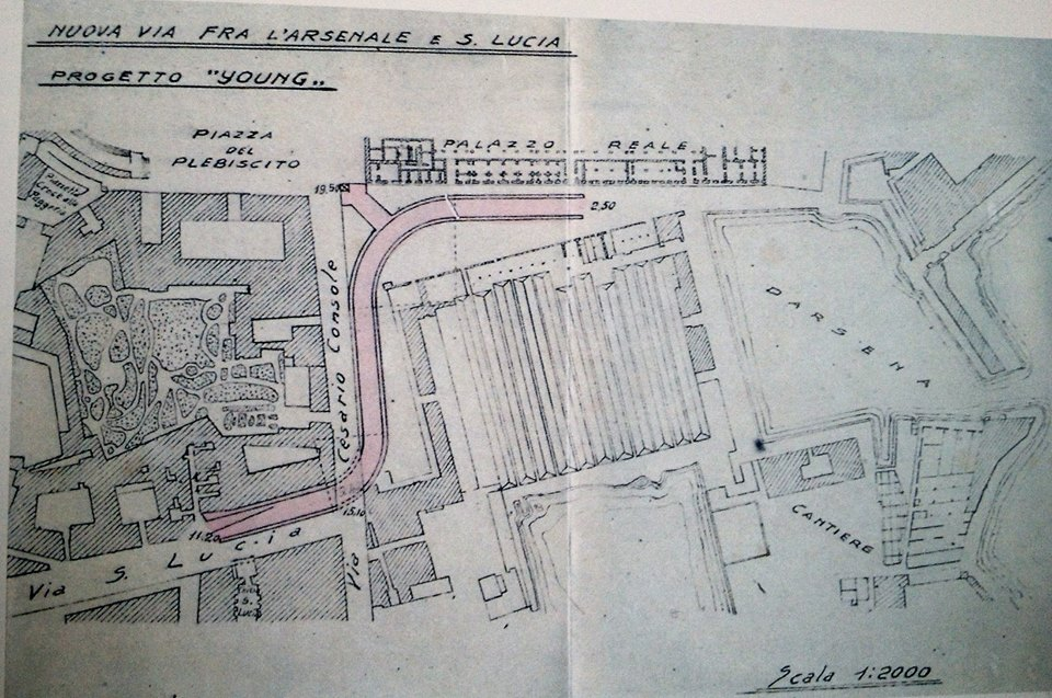 Lamont Young - Napoli, progetto di una strada di collegamento fra Santa Lucia ed il Molosiglio, ai piedi del Palazzo Reale. Si notano ancora gli edifici del vecchio Arsenale (abbattuti nel 1929).